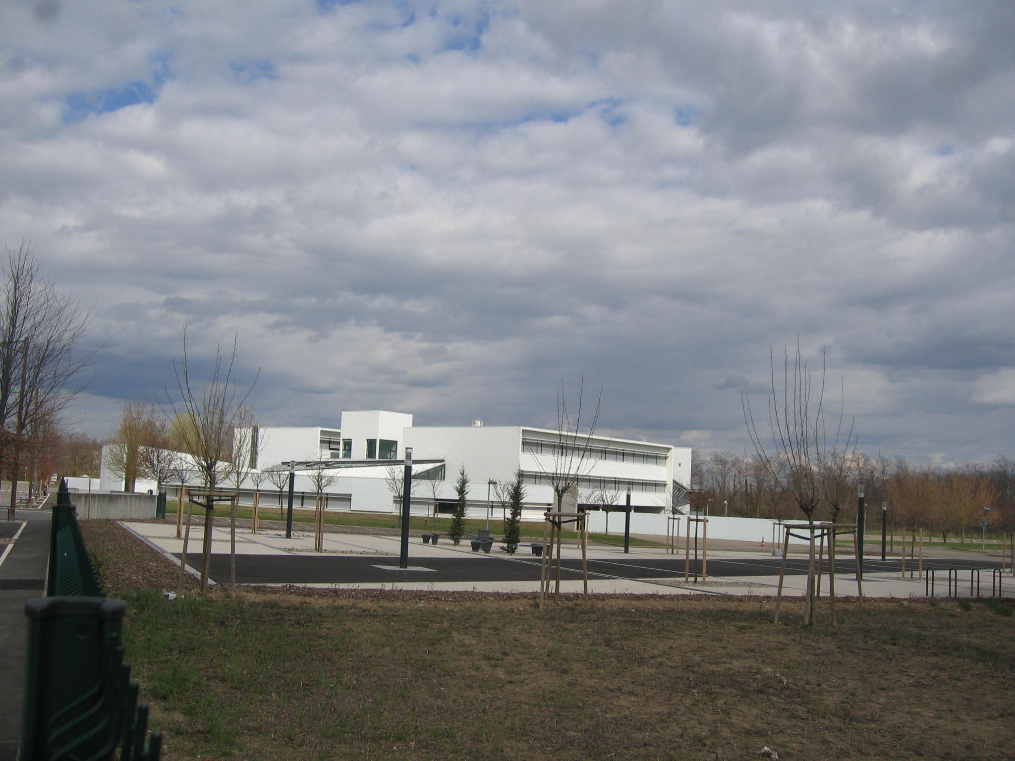 Le biopôle de Colmar